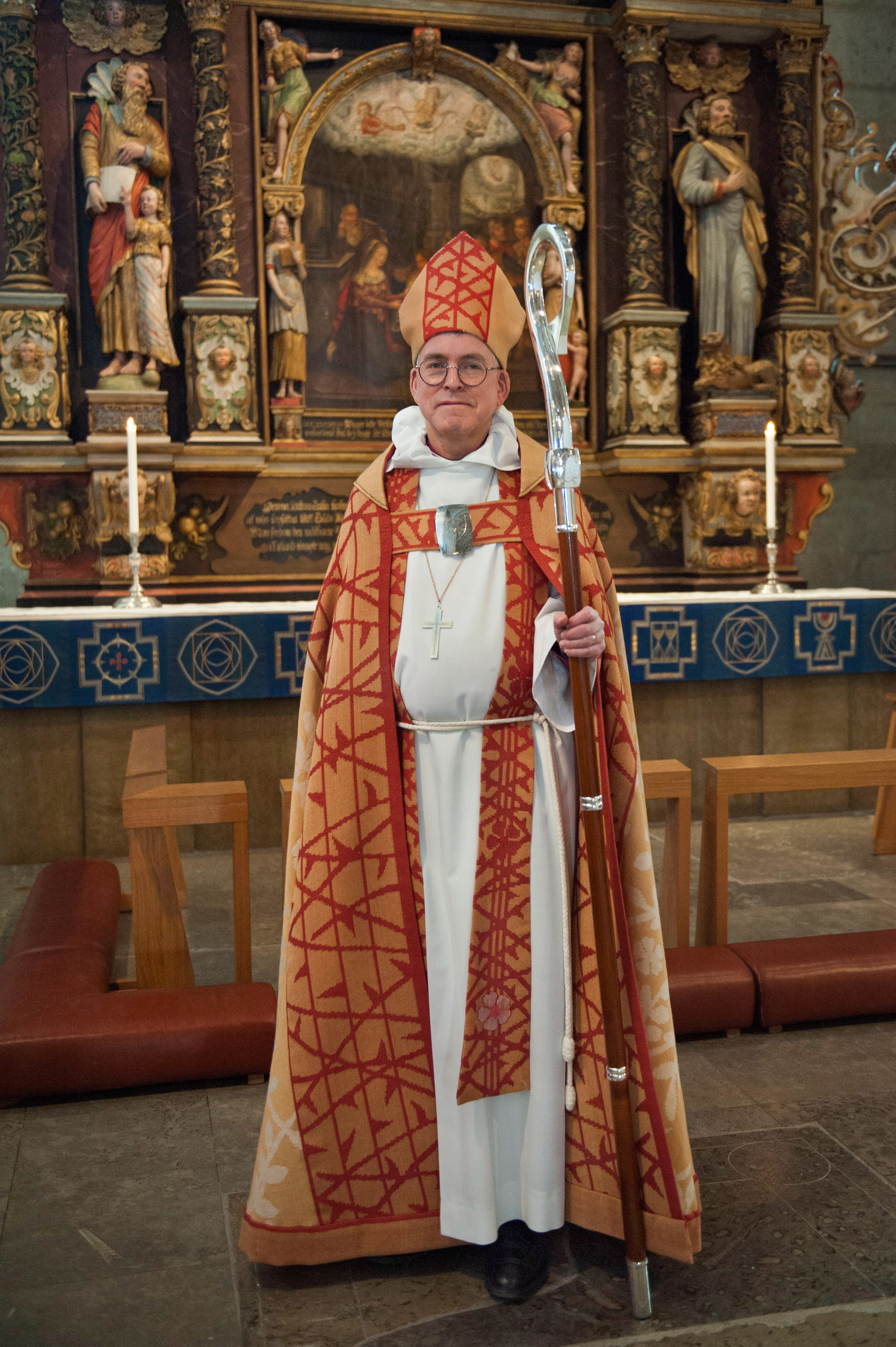 Foto: Carla Karlsson